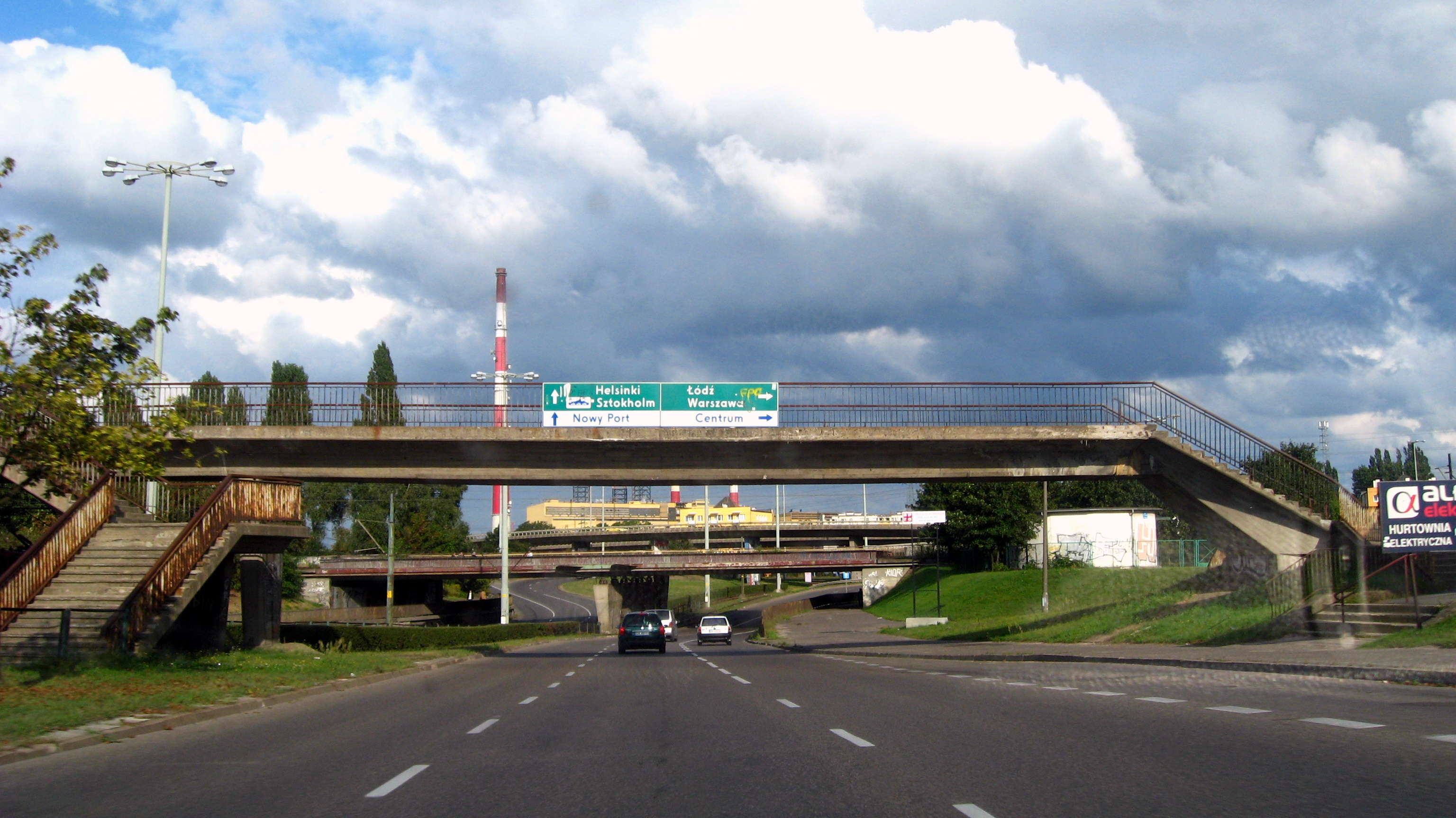 Gdańsk, ul. Kliniczna, wiadukty